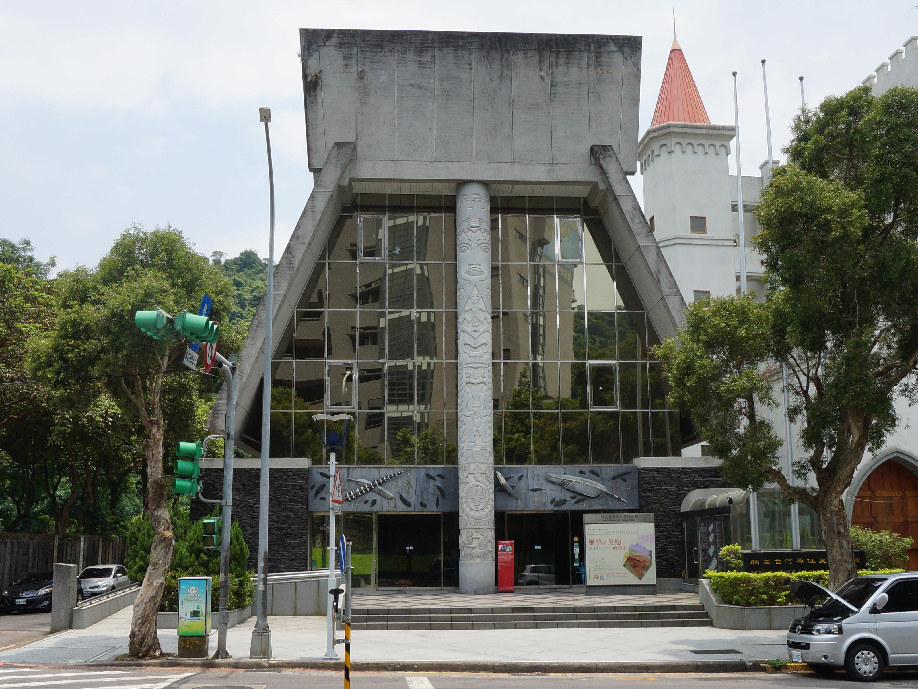 順益台灣原住民博物館正面。